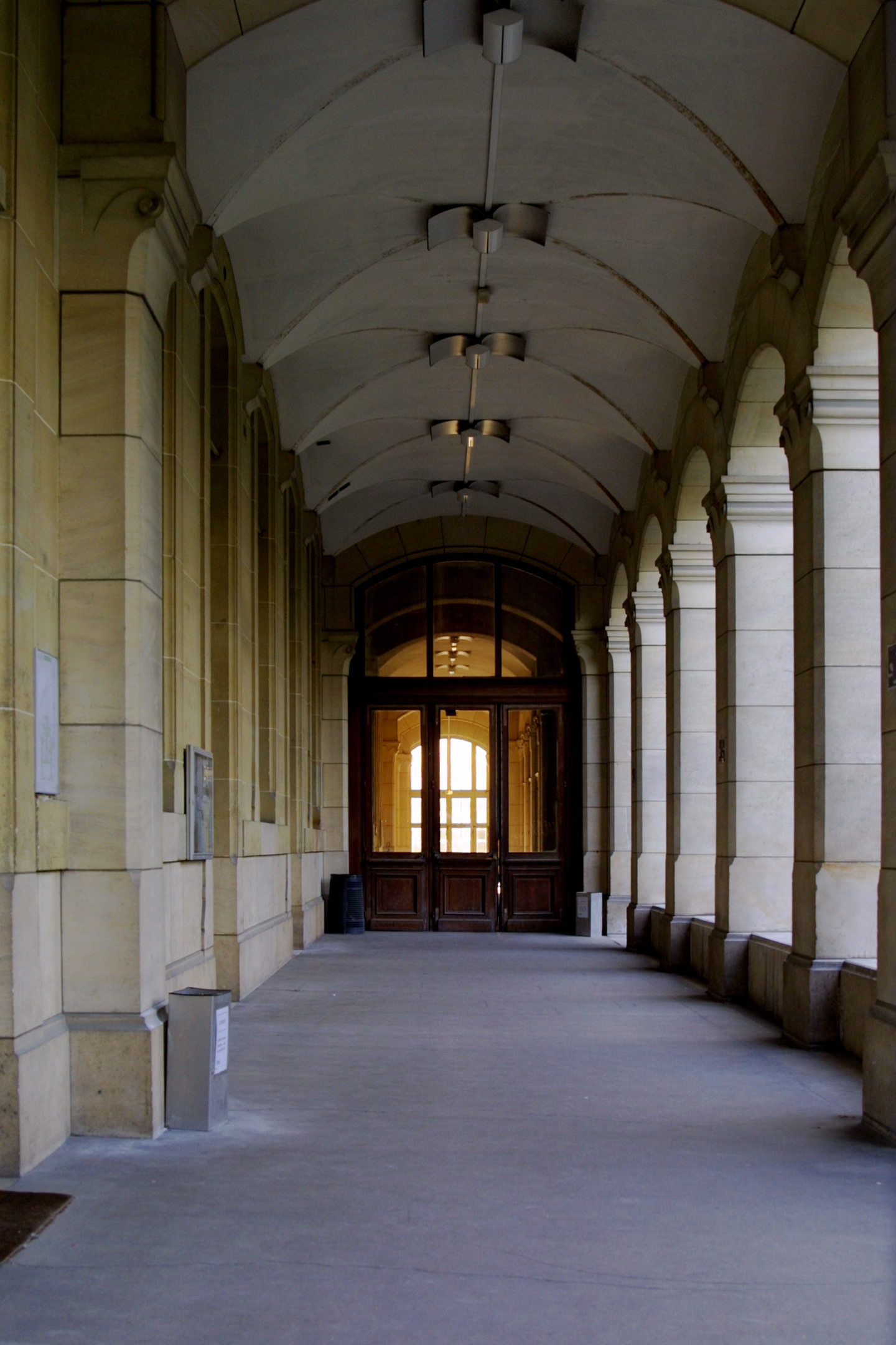 Couloir de la faculté de pharmacie René-Descartes